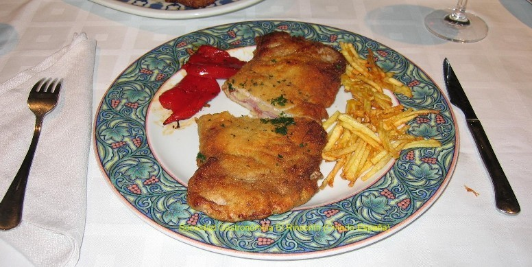 sandwich de carne, jamón y queso típico de Asturias-España